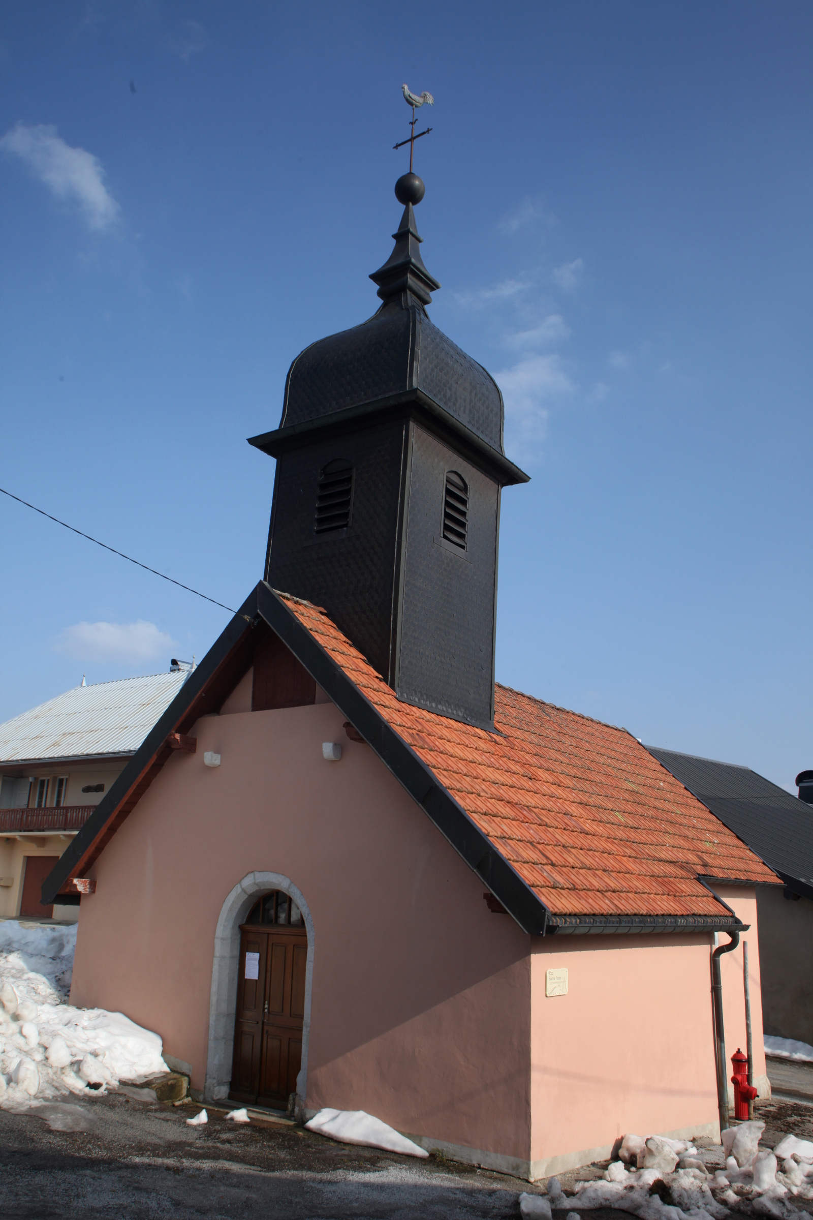 Chapelle Sainte-Anne au Crouzet (Doubs)